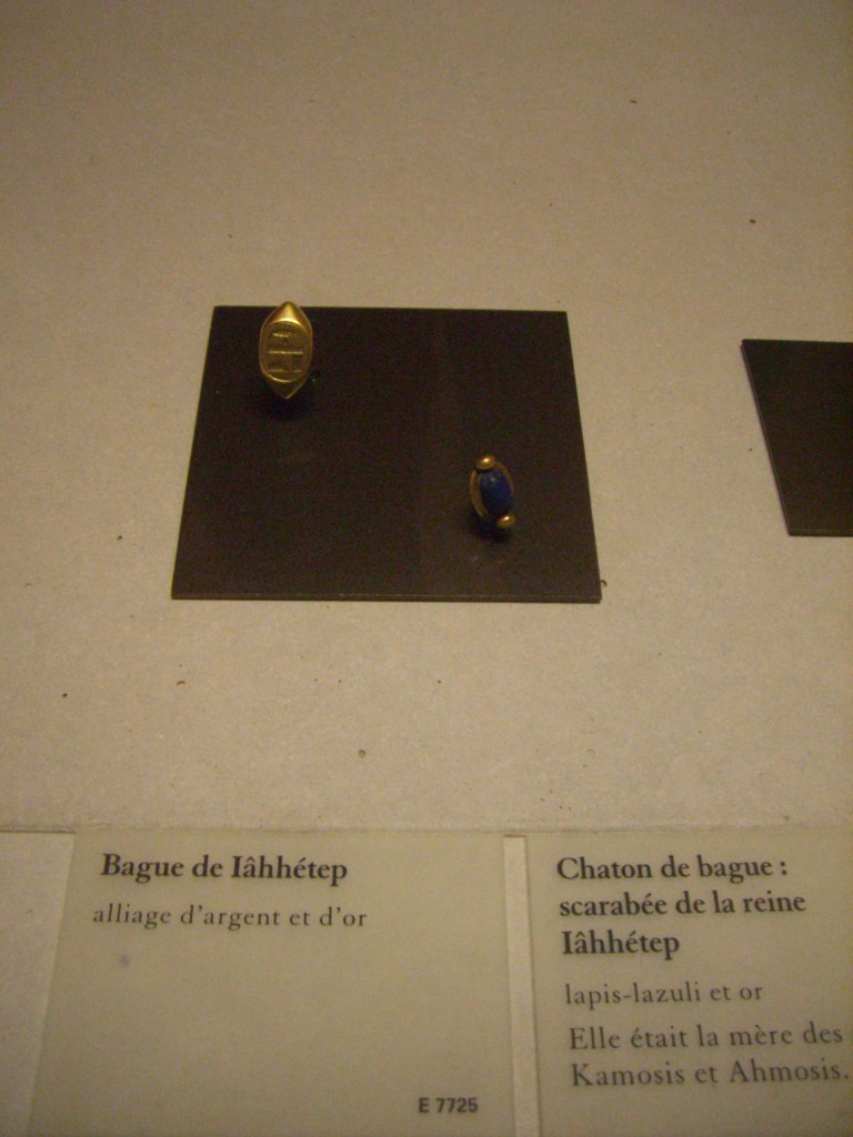 Bagues au nom d'Ahhotep mère d'Ahmôsis - XVIIIe dynastie égyptienne